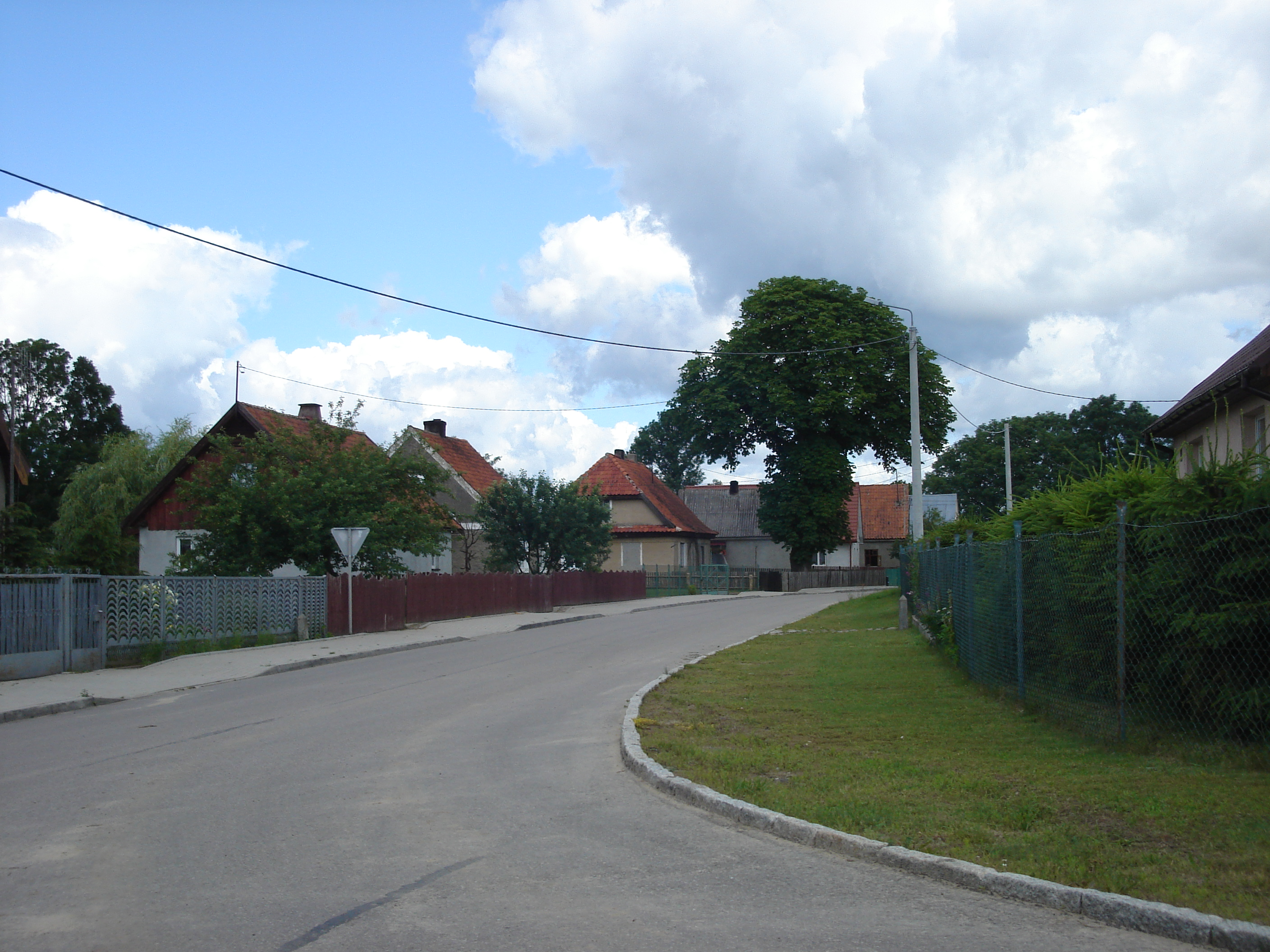 Wieś Faryny